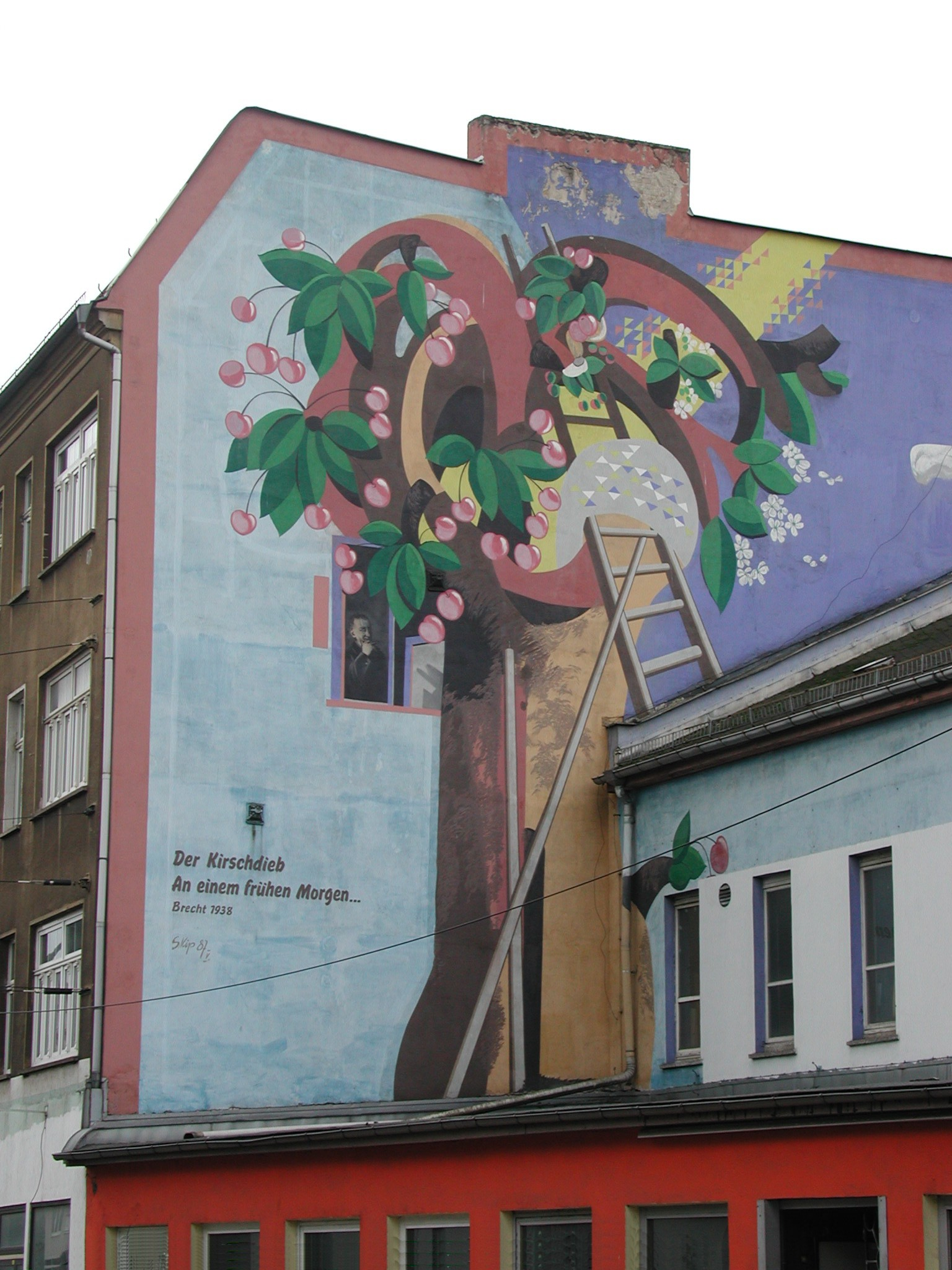 Illustration zu einem Gedicht von Brecht (Der Kirschdieb, 1938) an einer Giebelwand in Berlin-Weißensee